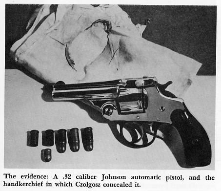 a Pistola de Leon Czolgosz